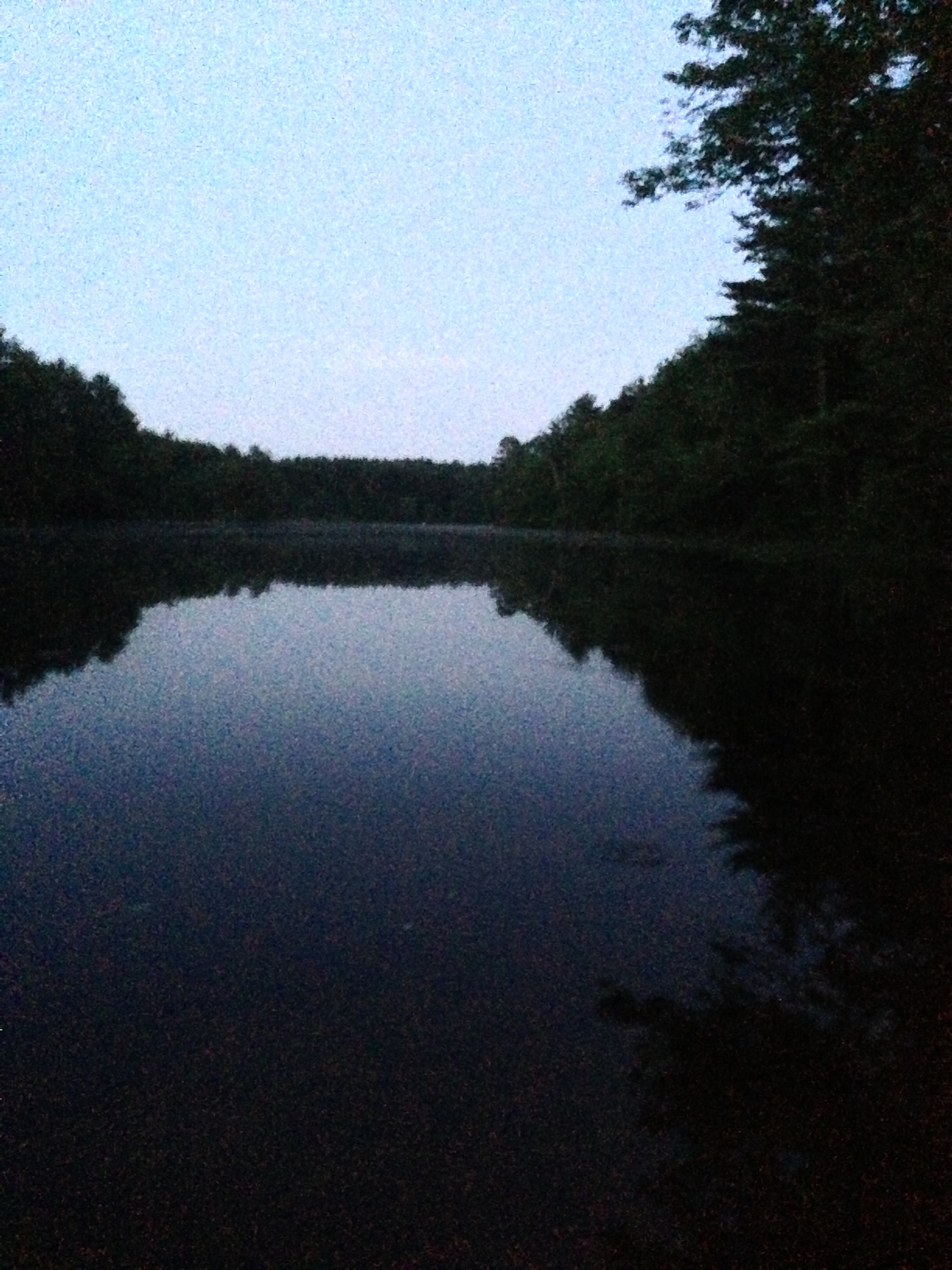 Tarbox Pond West Greenwich, RI 02874